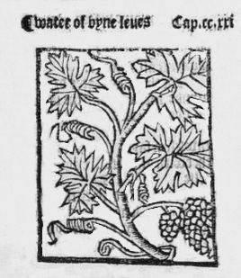 Illustration de la notice distillat de feuilles de vigne de Brunschwig.